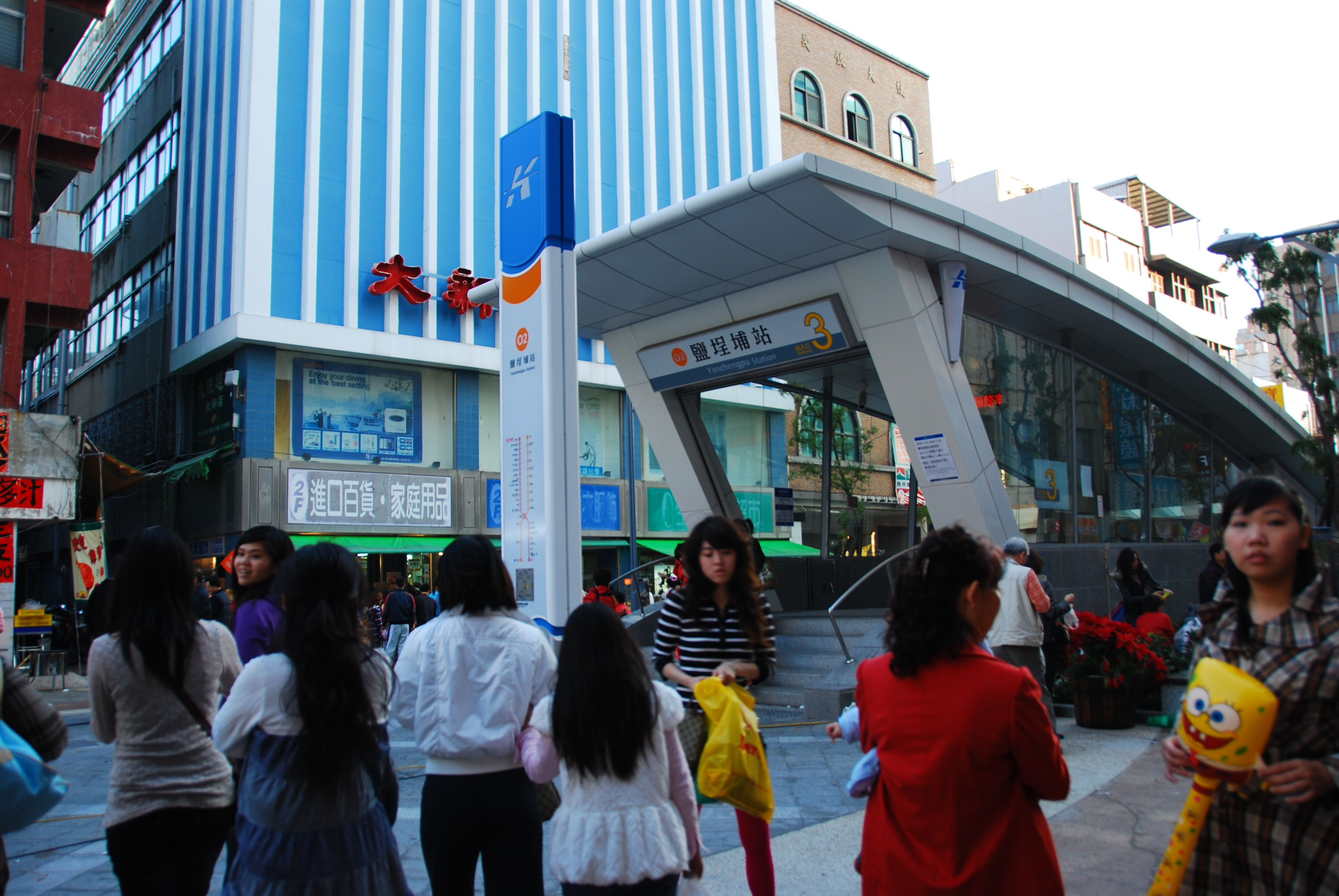 高雄捷運鹽埕埔站3號出口與大新百貨。